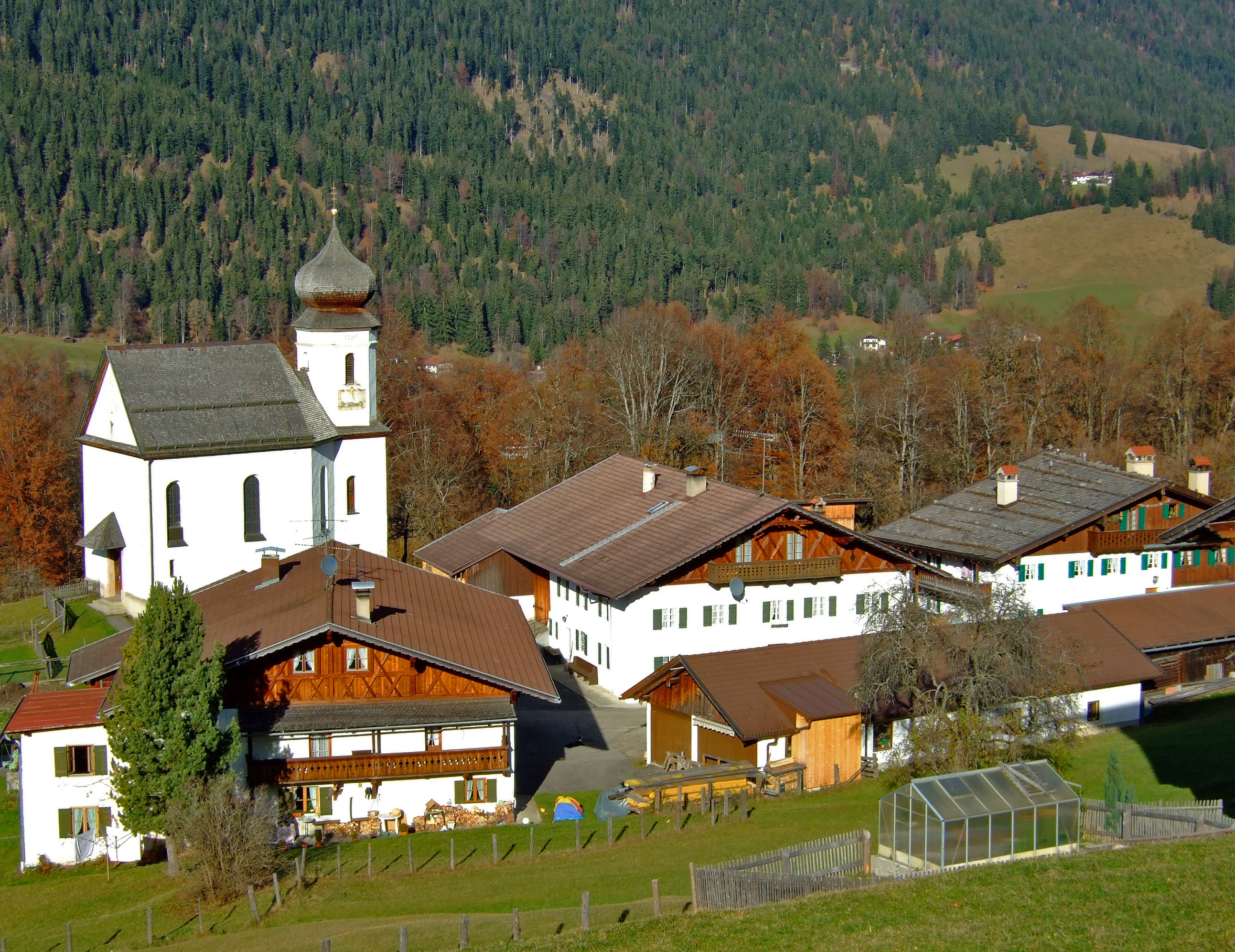 Gebirgsdorf in den Bayerischen Alpen